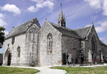 Eglise de Clohars-Fouesnant (29) Finistère.